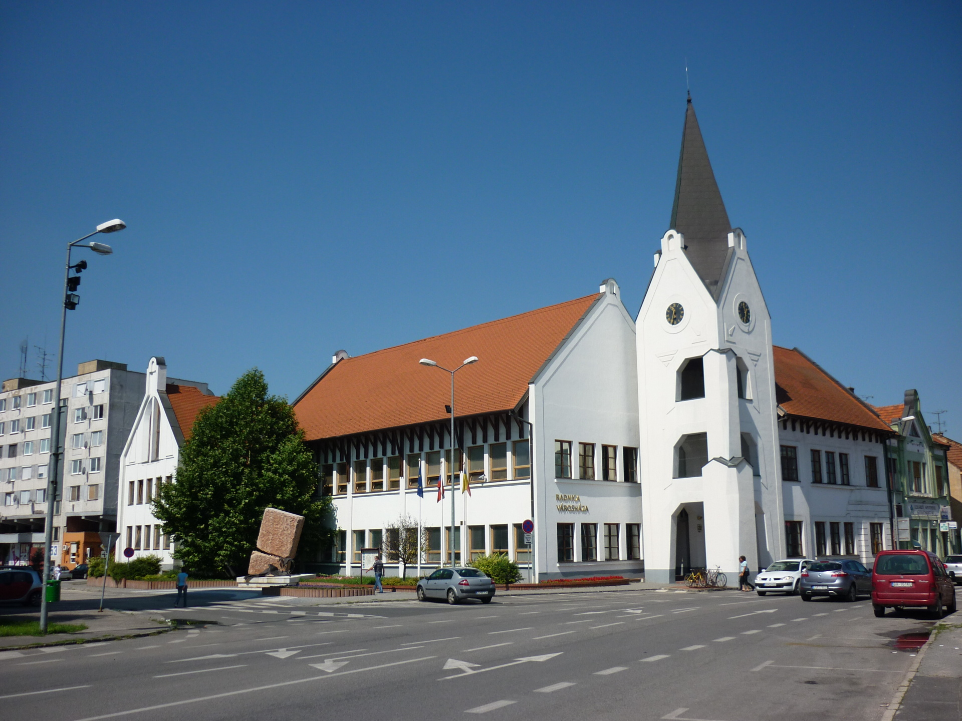 Dunajská Streda